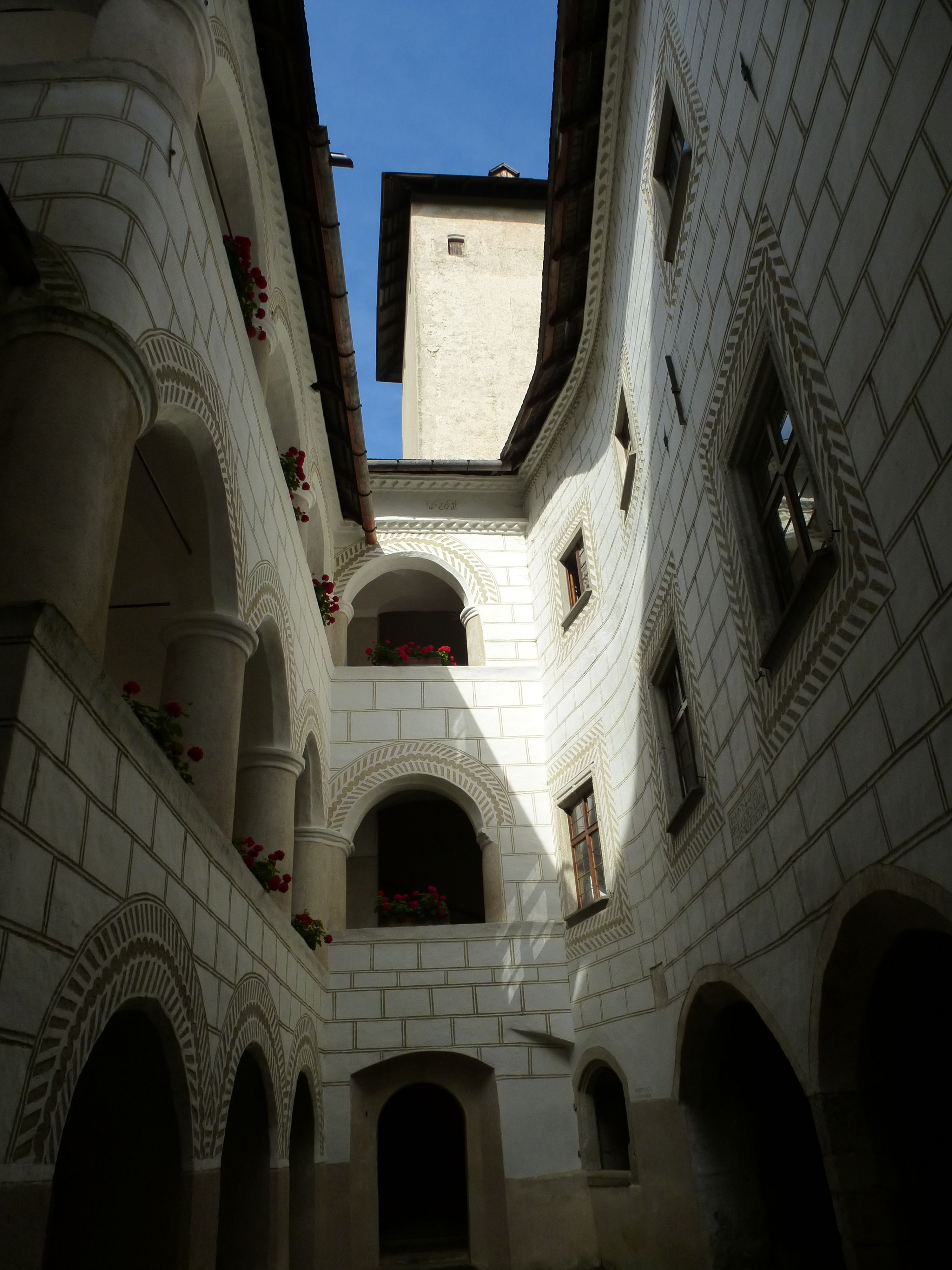 Rappottenstein - Burg Dieses Bild wurde anlässlich des österreichischen Tags des Denkmals 2012 in Niederösterreich eingereicht.